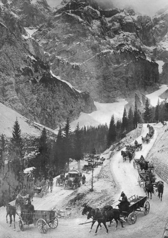 Die siegreiche Isonzo-Offensive. Der Durchstoss bei Flitsch. Trainkolonne der Verbündeten im Vormarsch auf einer der Pass-Strassen gen Flitsch. Filmtrupp No:5. Erzherzog Eugen-Strasse, Moistroka-Pass, Oktober 1917